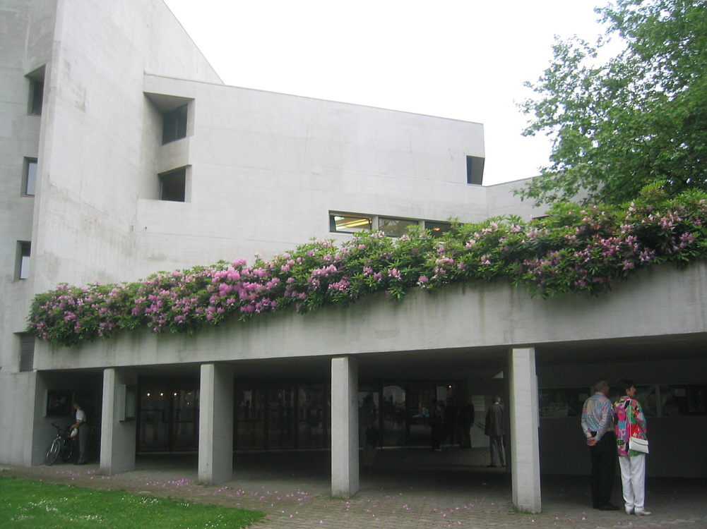 St. Gallen, Switzerland: Theater